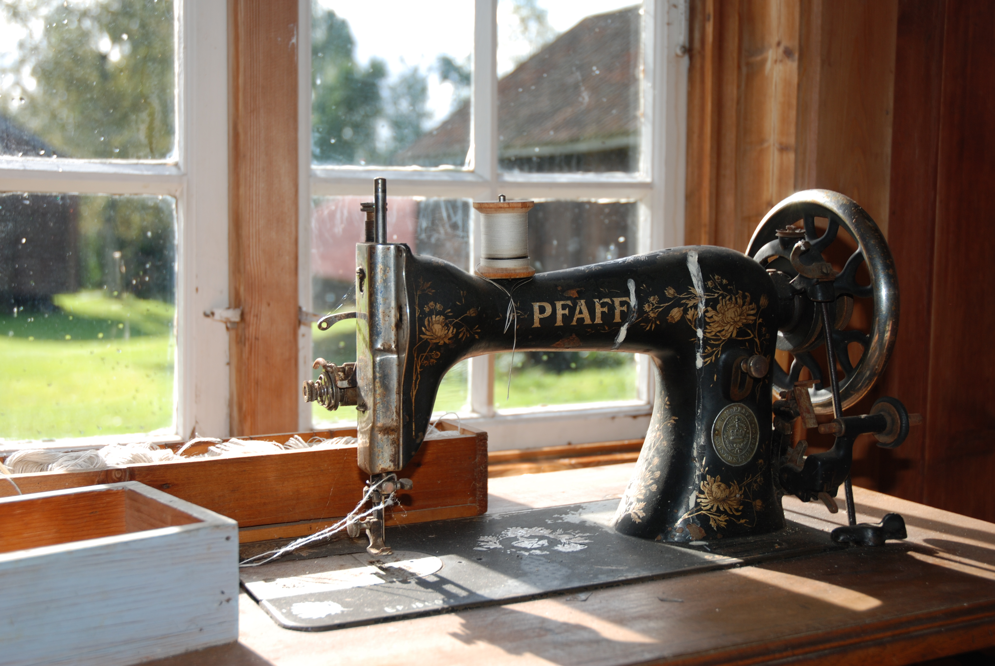 Detalj fra en av Eidsvoll bygdetuns bygninger